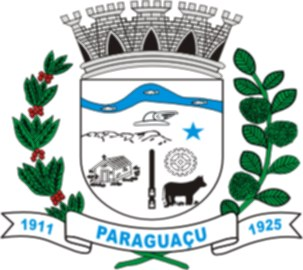 Brasão do município